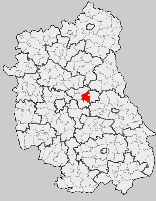 Map of gmina Puchaczów, Łęczna county, Lublin voivodship Mapa gminy Puchaczów, powiat łęczyński, województwo lubelskie